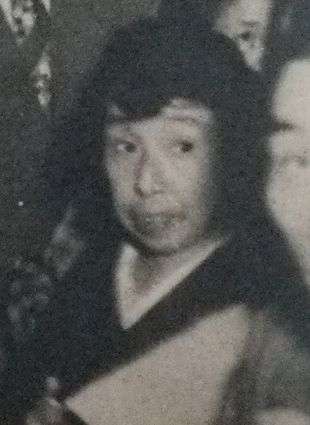 柳兼子（ユーディ・メニューイン訪日公演時）